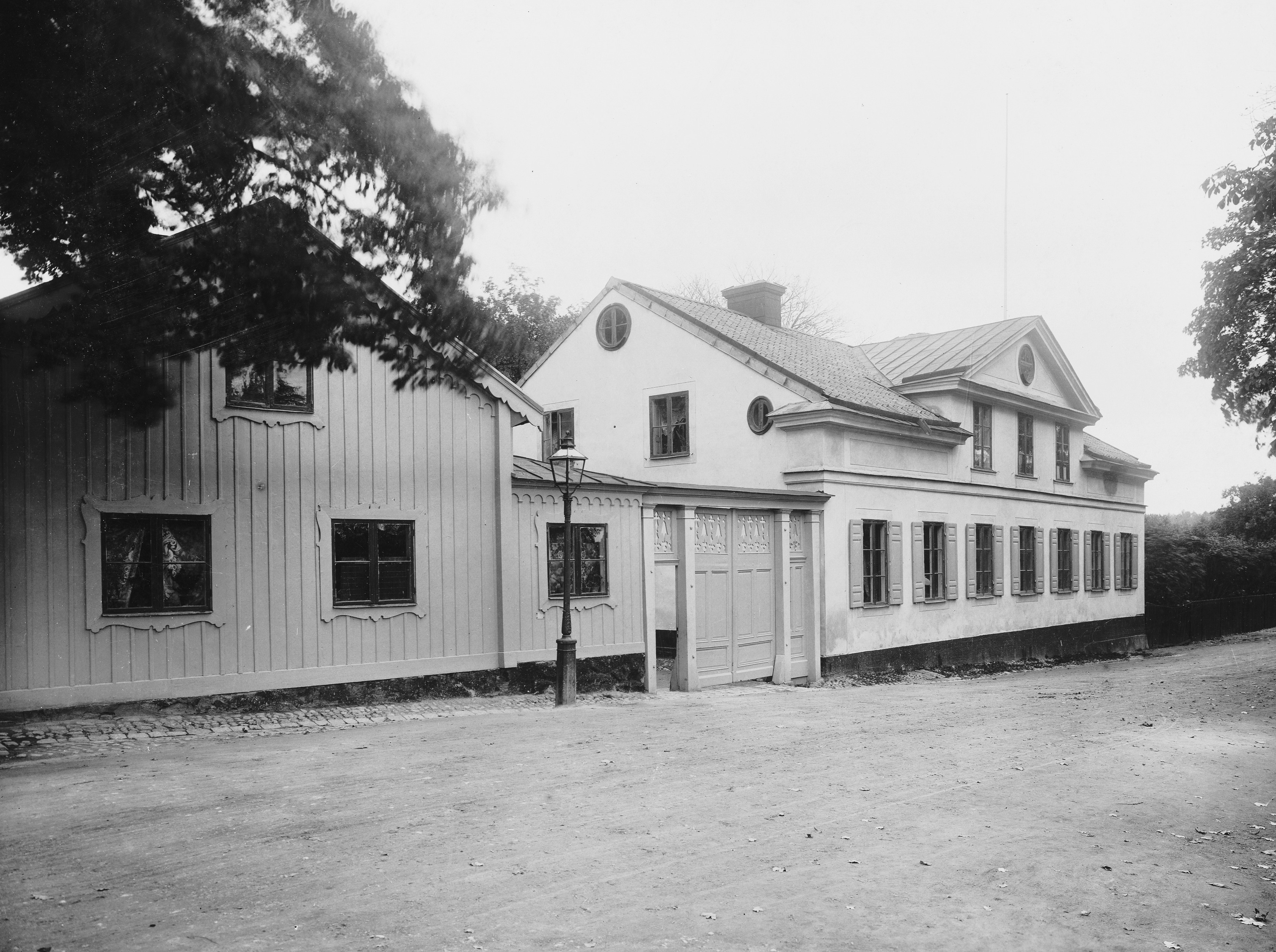 Djursborg vid Ladugårdstull 1903